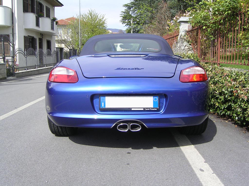 Puffetta al posteriore